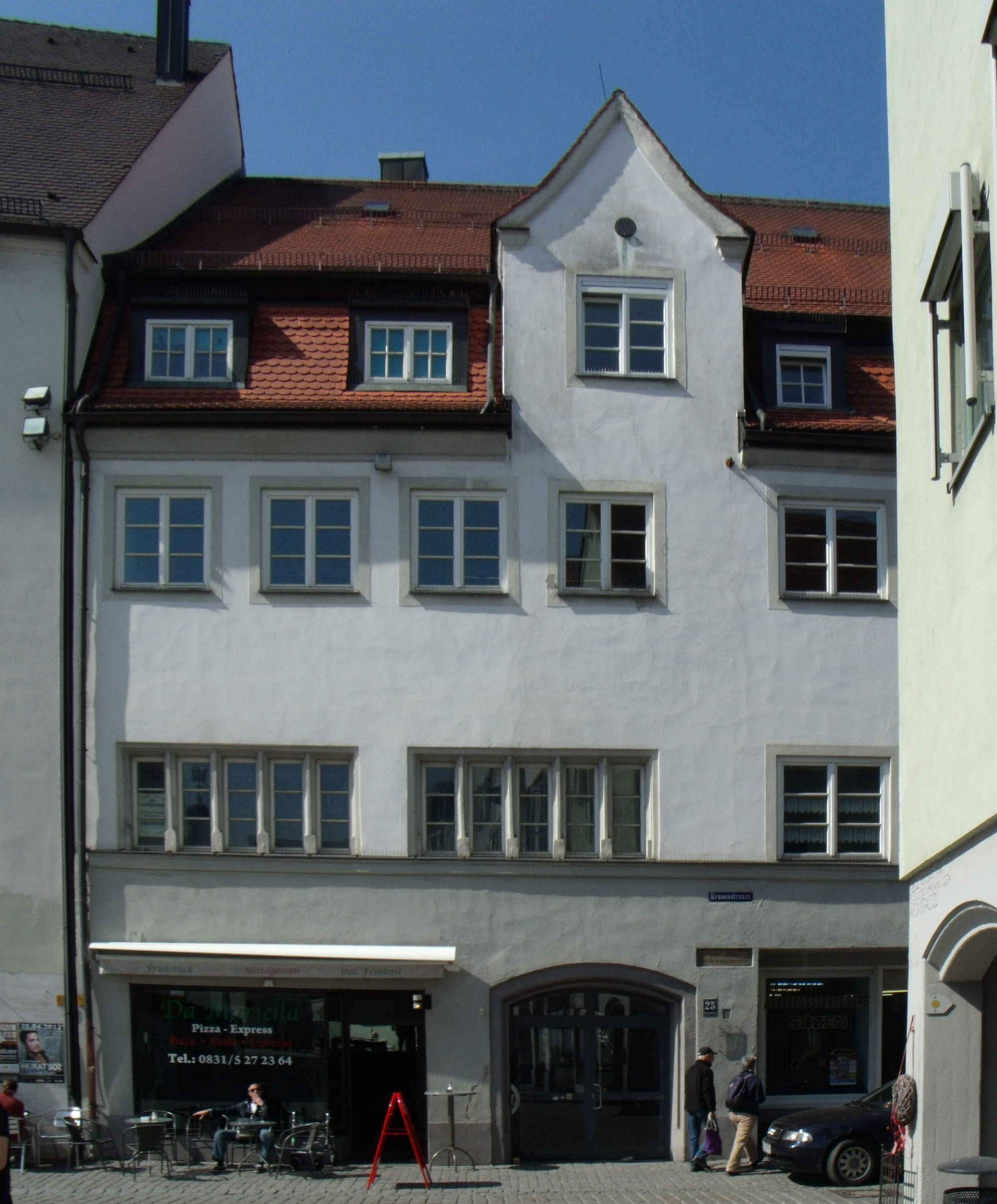 Baudenkmal